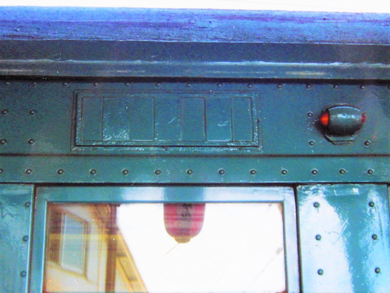 国鉄32系電車 サハ45004 側面方向幕取付跡